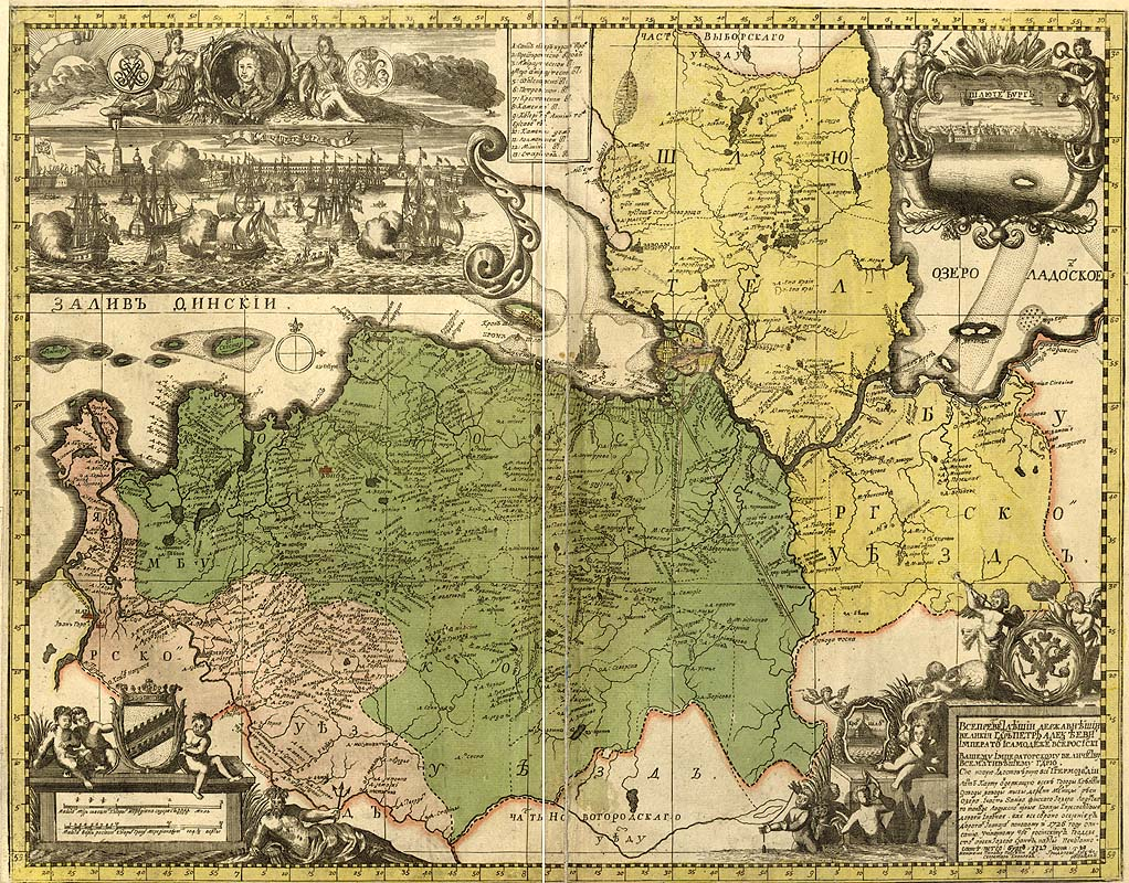 Мапа Інгерманландської губернії в складі Російської імперії